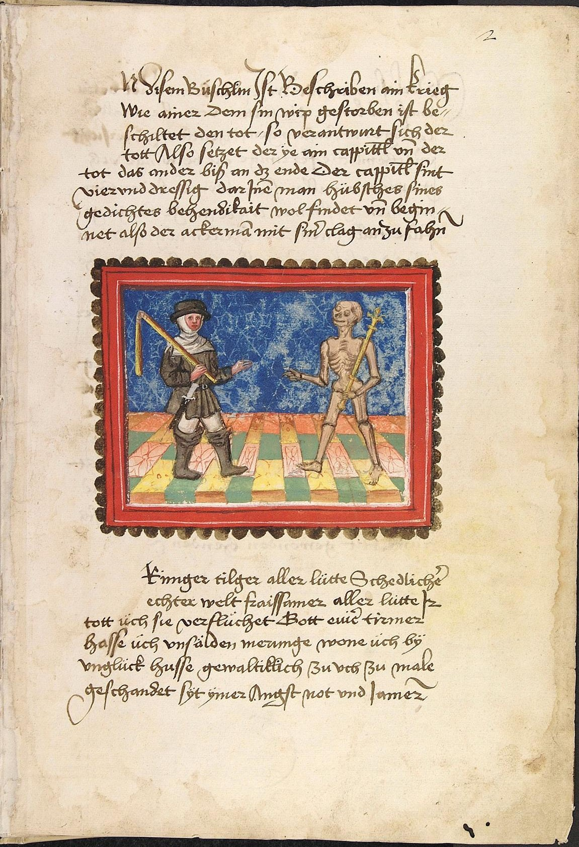 Codex Palatinus germanicus 76, Blatt 2r - Johannes von Tepl: Der Ackermann aus Böhmen - Der Ackermann klagt den Tod an (erstes Textblatt)